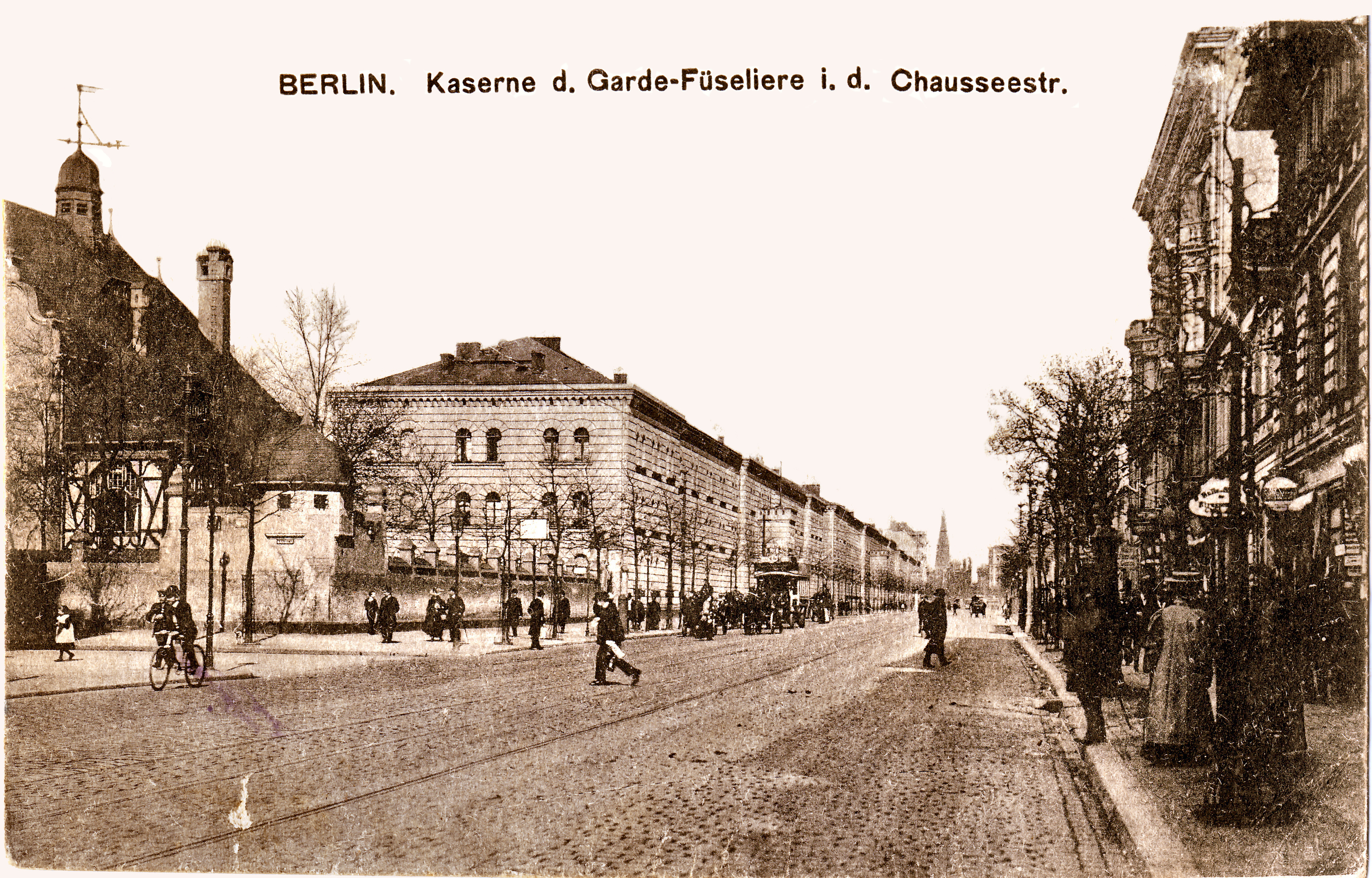 Die Kasernen der Garde-Füsiliere in der Chausseestraße um 1910. Von links nach rechts: Ecke Kessel-Straße mit Offizierskasino, Kasernen, Kriegervereinshaus und Turm der Dankeskirche. Auf der rechten Seite die noch heute existierende Nr. 36, das niedrige ehem. Vorderhaus von Carl Flohr mit der bekannten Wasserpumpe.